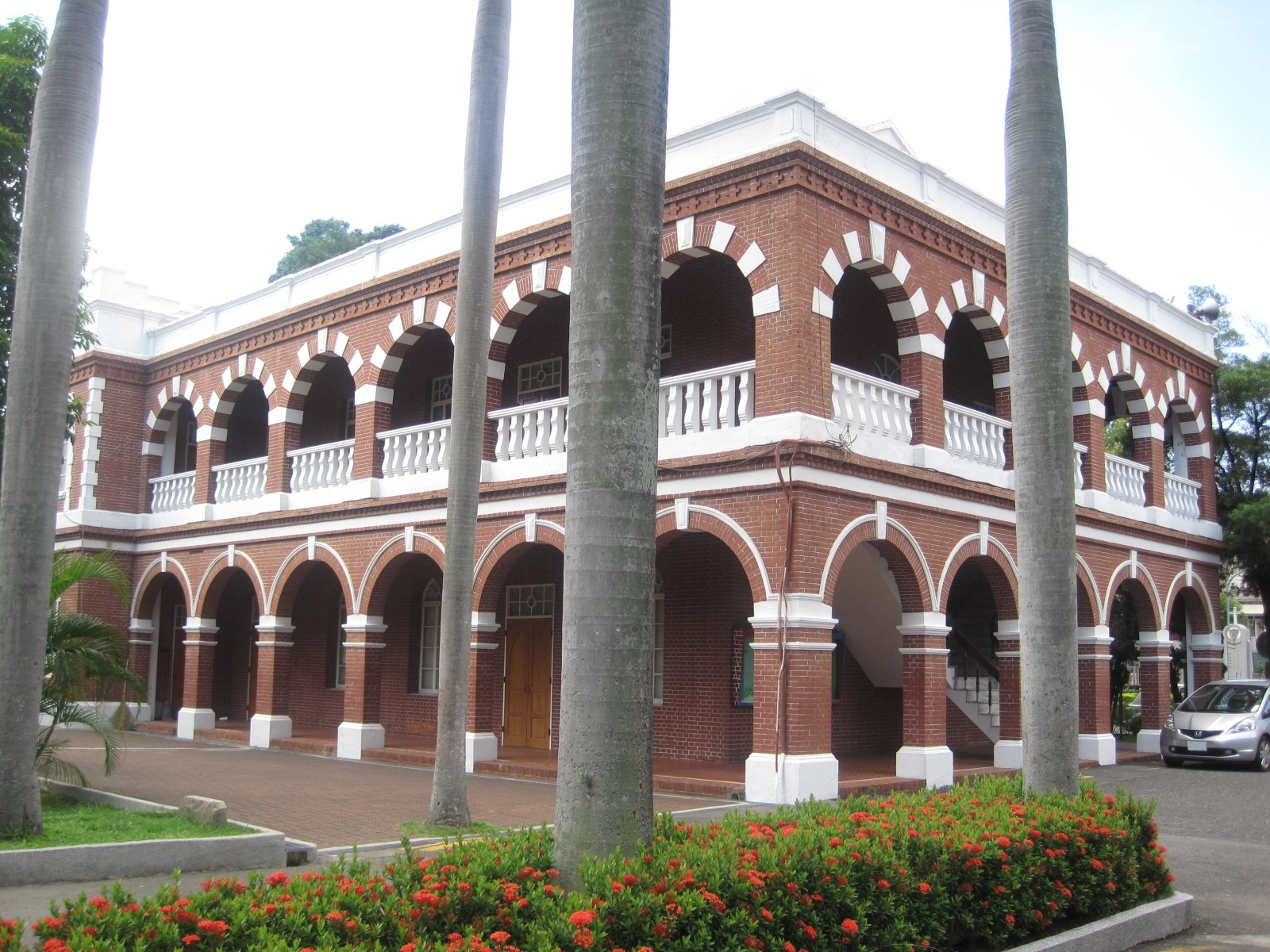 長榮中學教堂背面